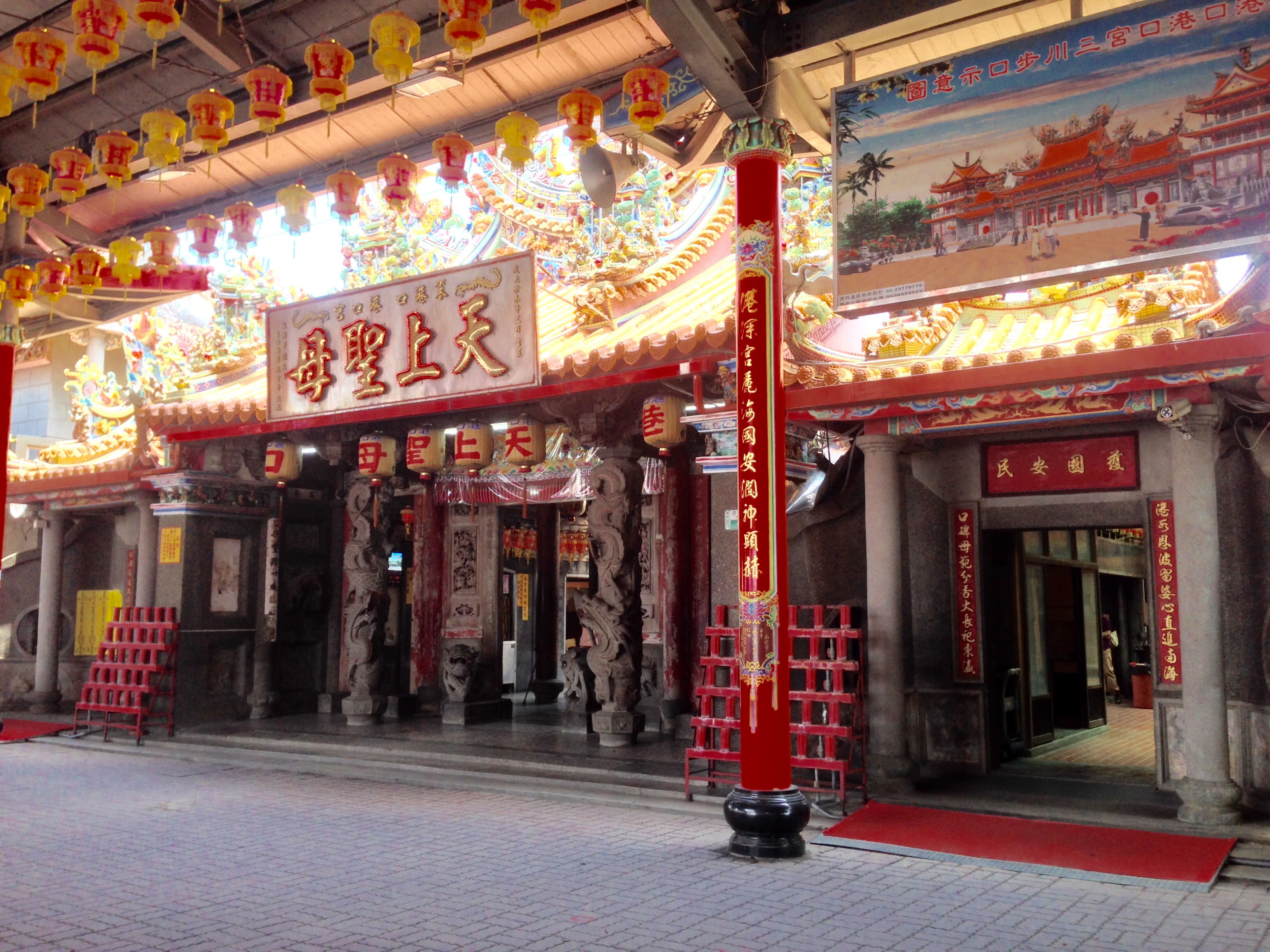 笨港口港口宮斜照